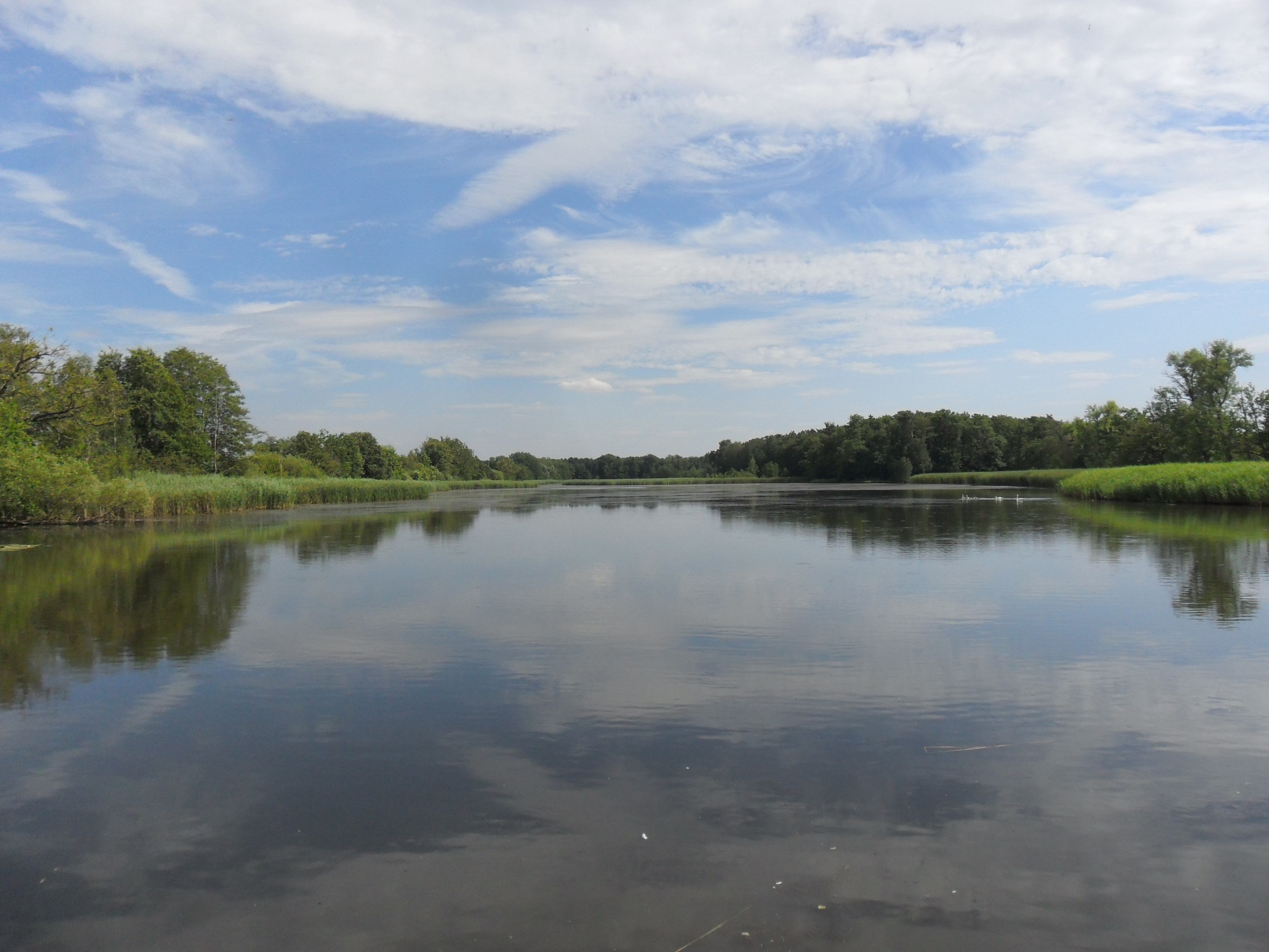 Teichlandschaft südlich von Mönau (Boxberg/O.L.)